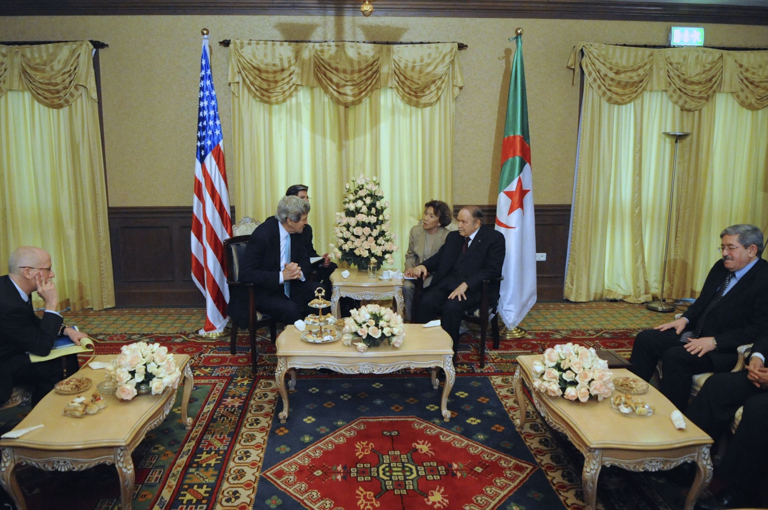 Le secrétaire d'État américain John Kerry reçu par le président algérien Abdelaziz Bouteflika, le 3 avril 2014, à Alger.